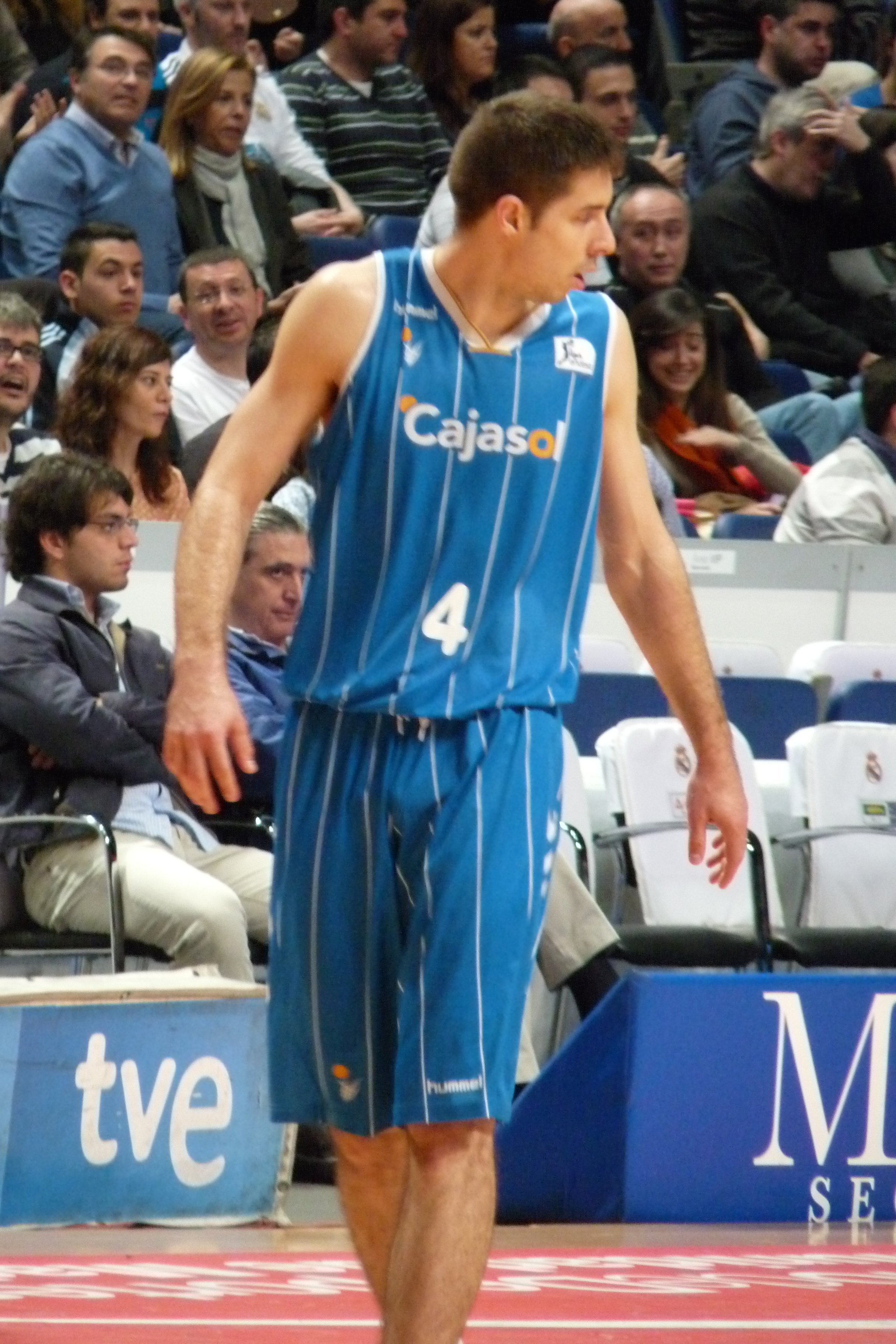 Milenko Tepić